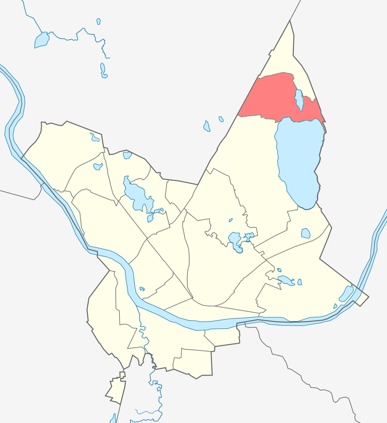 Микрорайон Малые Стропы карте Даугавпилса.